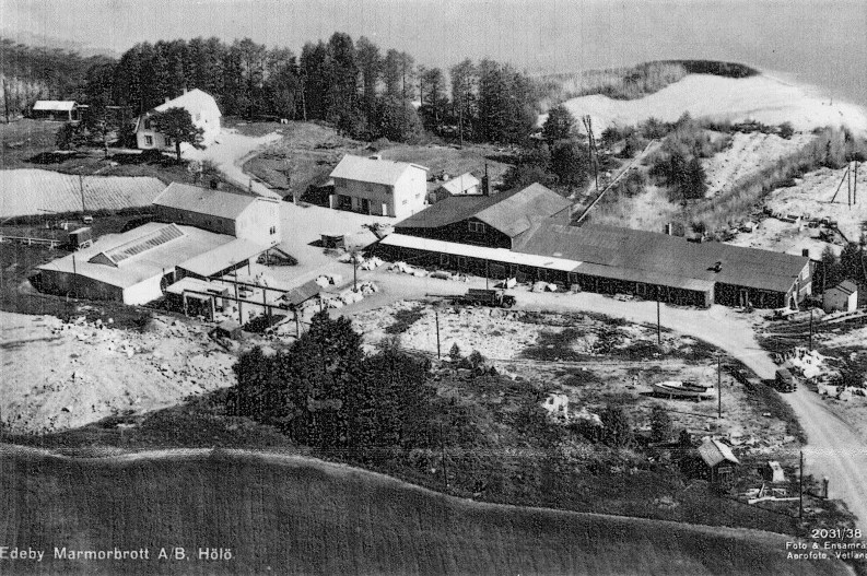 Flygfoto över Edeby marmorbrott, fabriksanläggningen vid Lillsjön